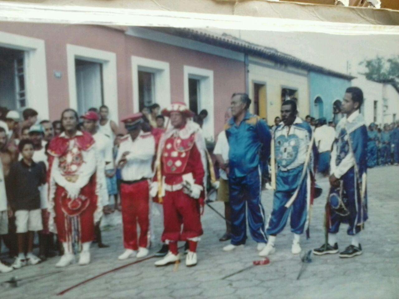 hsbdbhsn